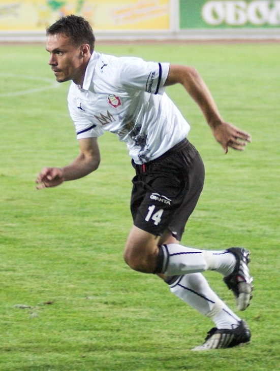 Парит Джихани — албанский футболист.